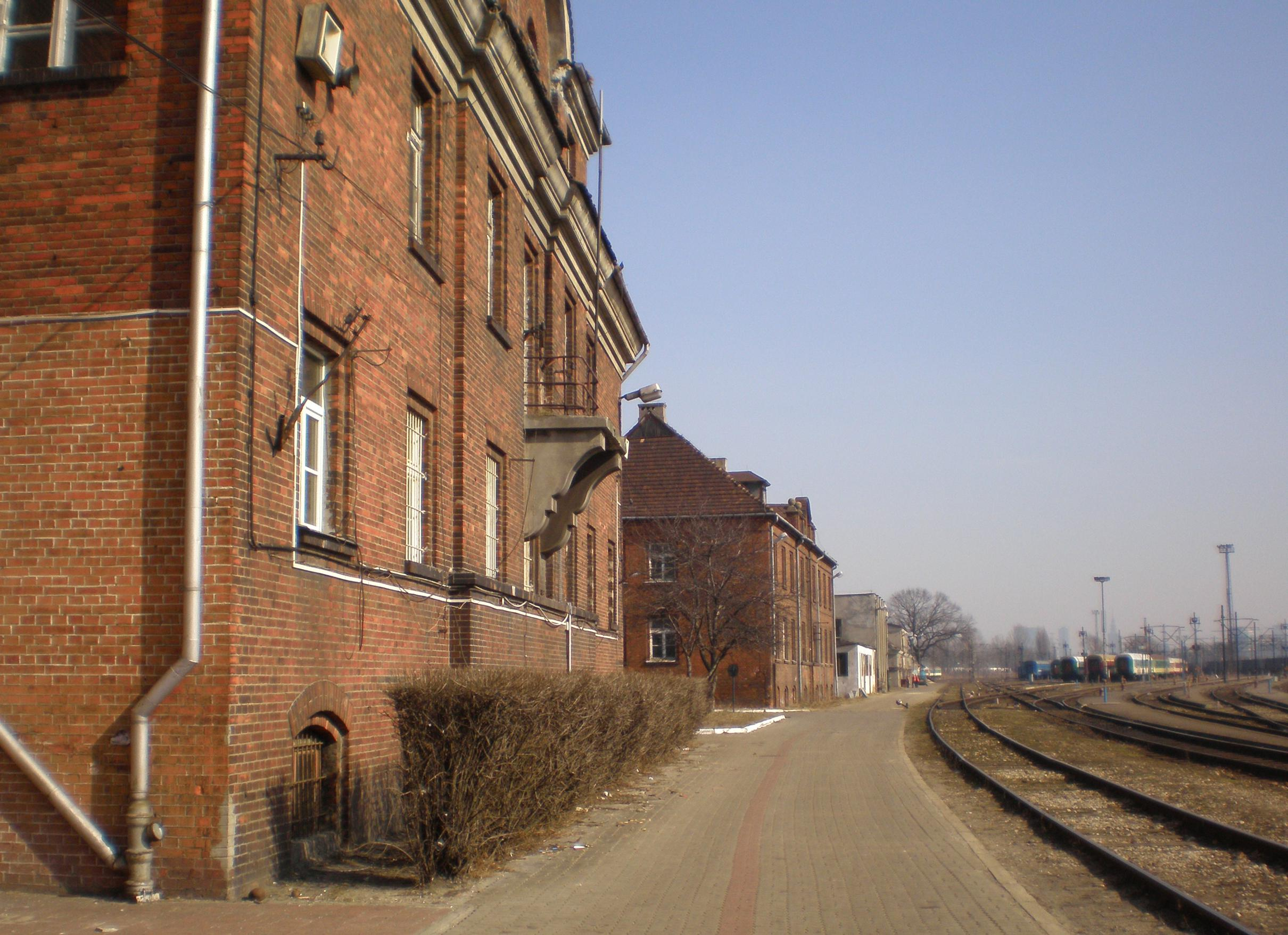 Zabytkowe budynki na terenie stacji postojowej Warszawa Szczęśliwice.